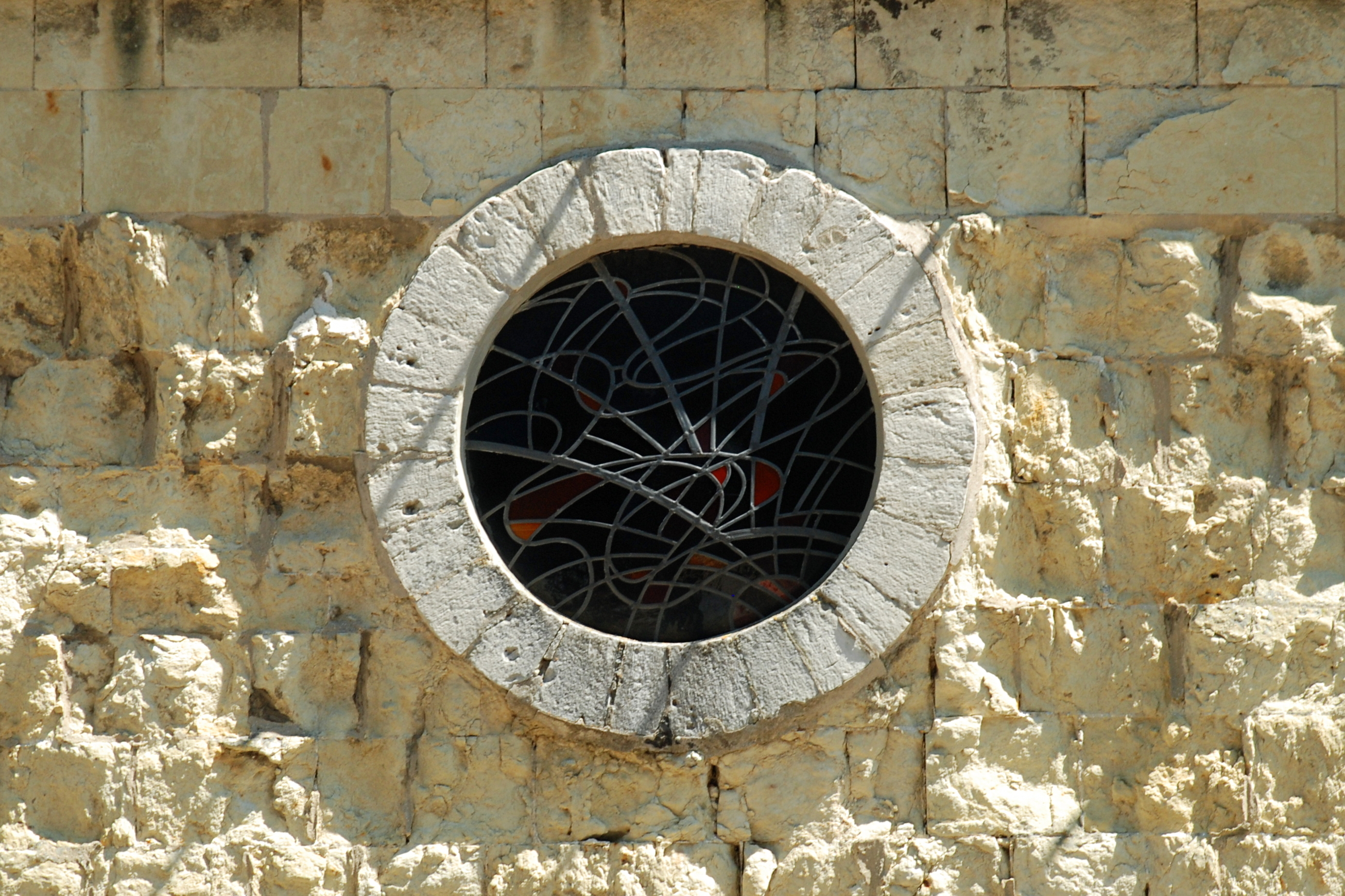 Belgique - Brabant wallon - Hélécine - Linsmeau - Église Saint-Pierre